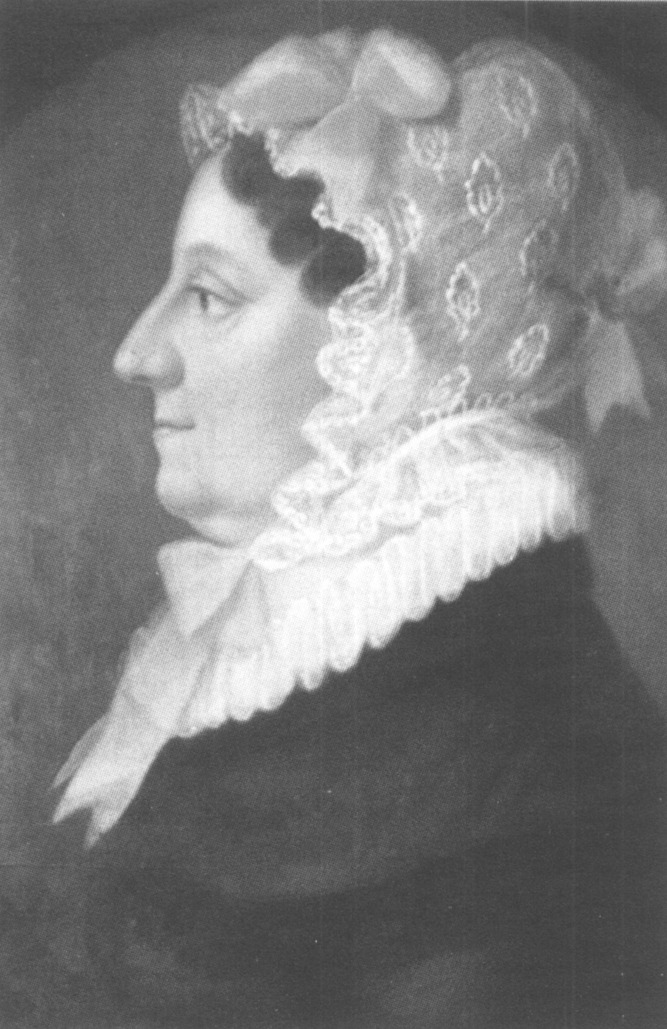 Christiane Friederike Suttinger geb. Gautsch (1762–1851), Ehefrau des Karl Benedikt Suttinger (1746–1830)